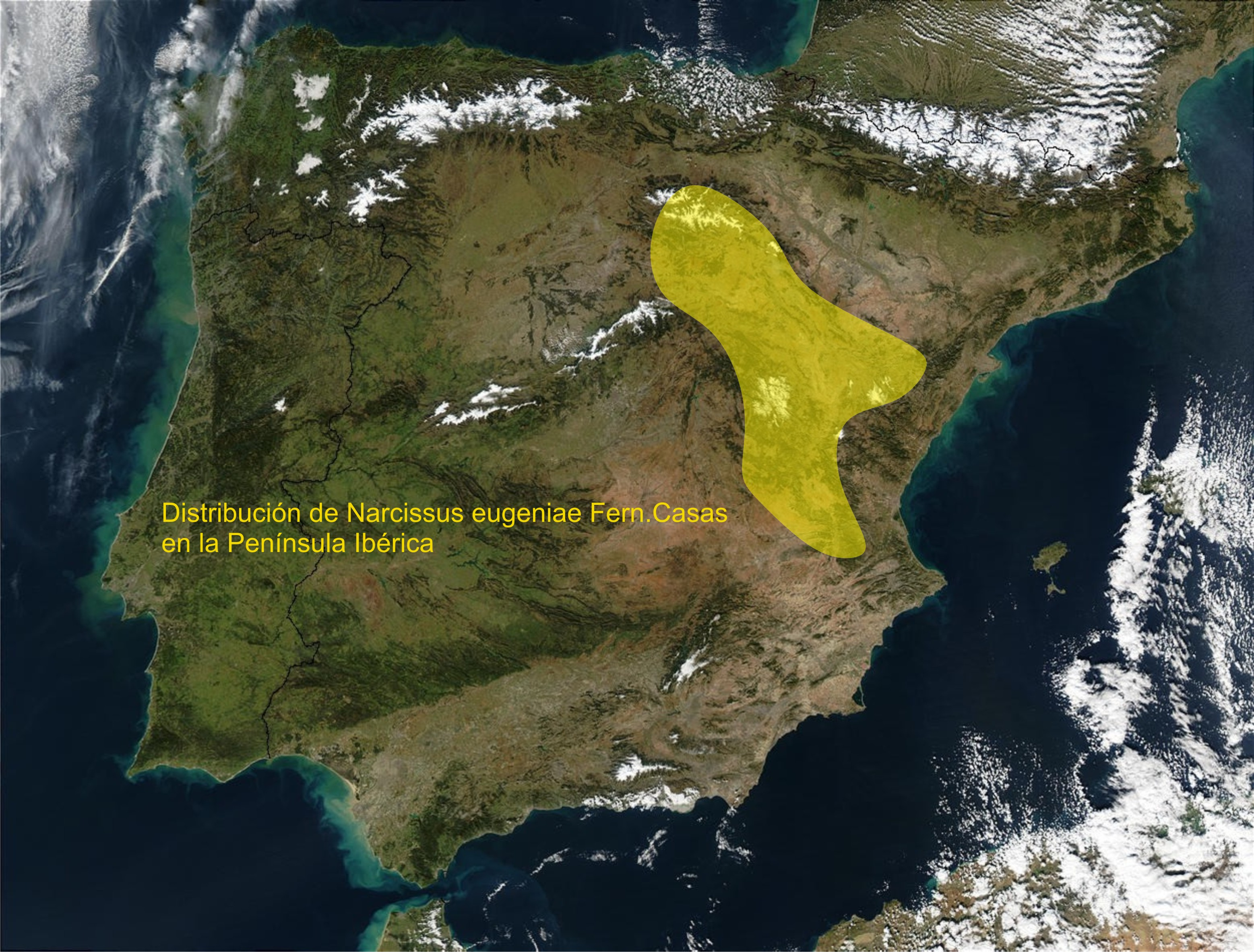 Área de distribución de Narcissus eugeniae Fern. Casas en la Península Ibérica (incluidos N. radinganorum y N. genesii-lopezii).